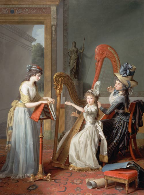 La leçon de harpe donnée par Madame de Genlis à Mademoiselle d'OrléansThe Harp Players